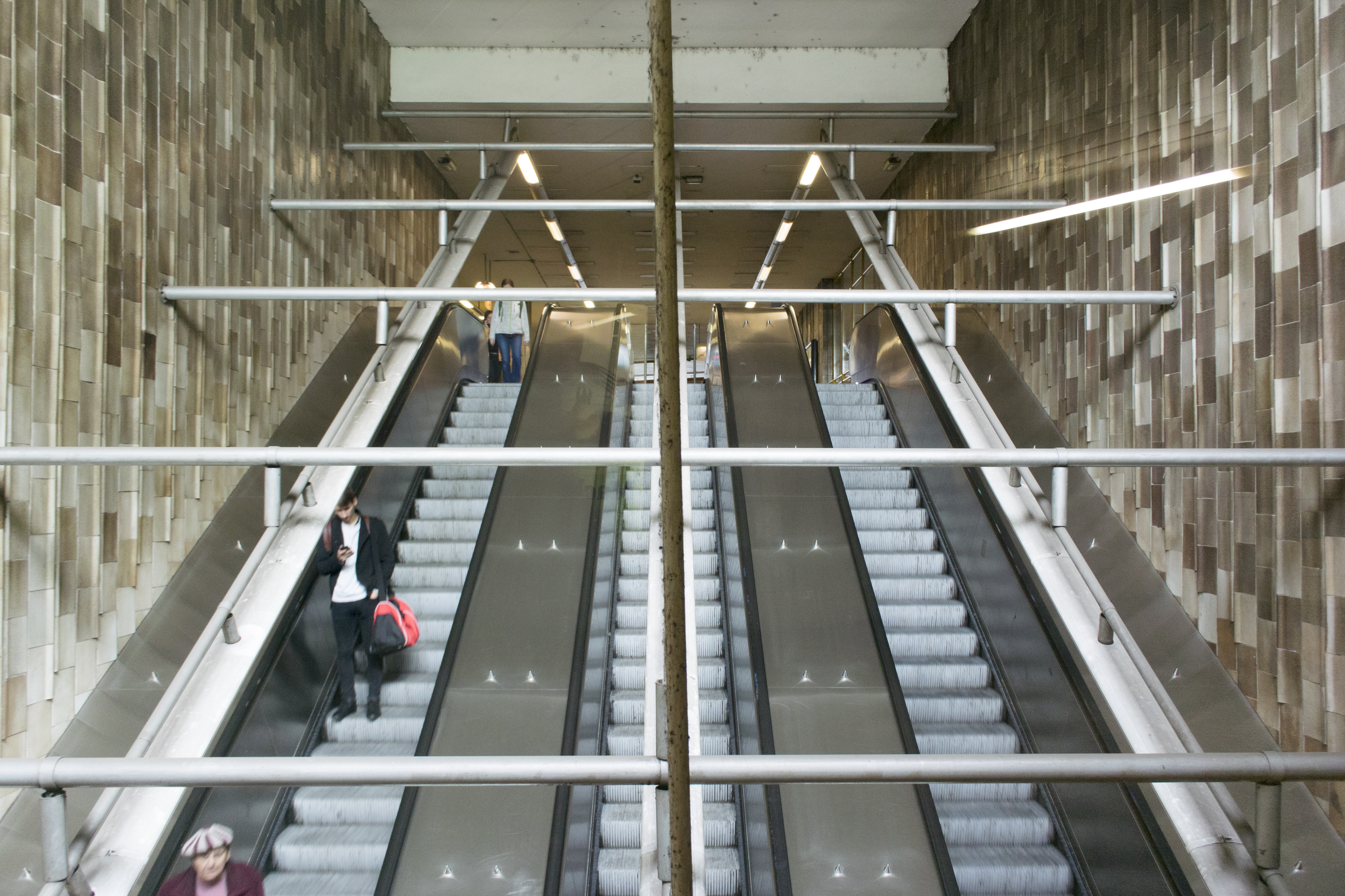 Pojízdný eskalátor trasy C ve Stanici Florenc - Praha